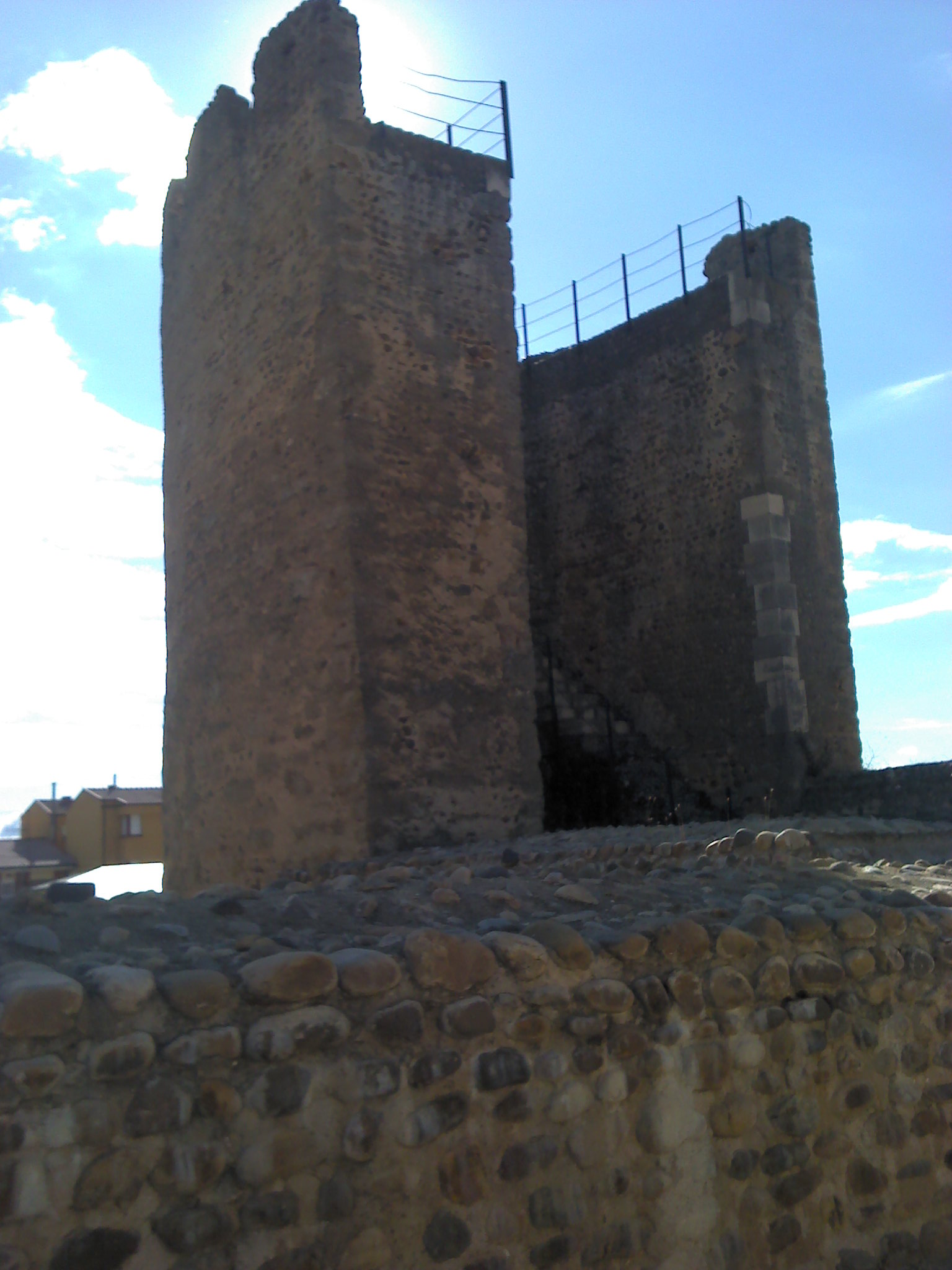 Cubo visitable perteneciente al Recinto Amurallado de Mansilla de las Mulas.